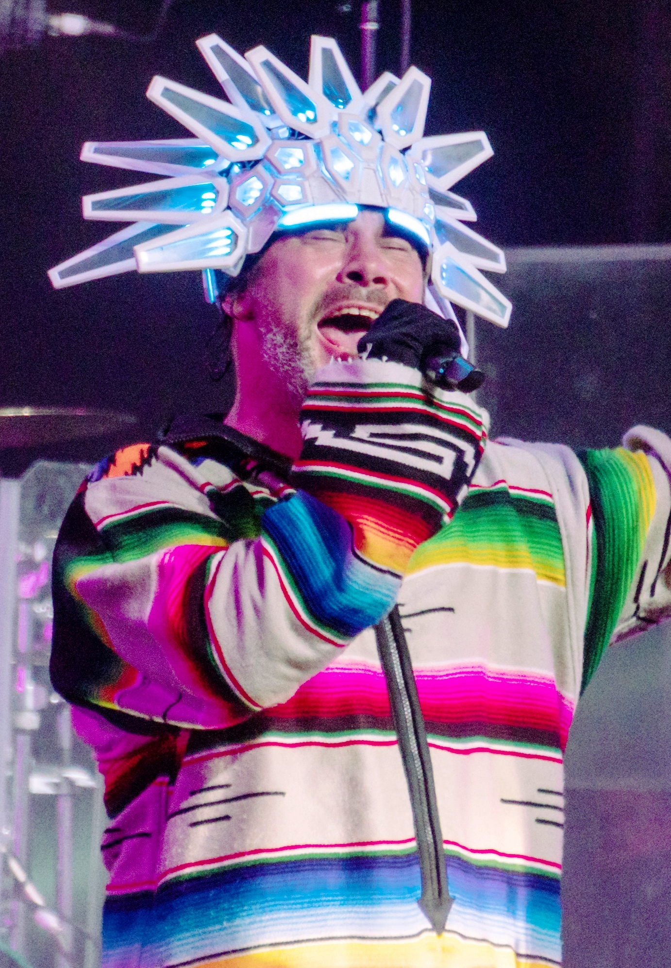 Coachella18W1-157